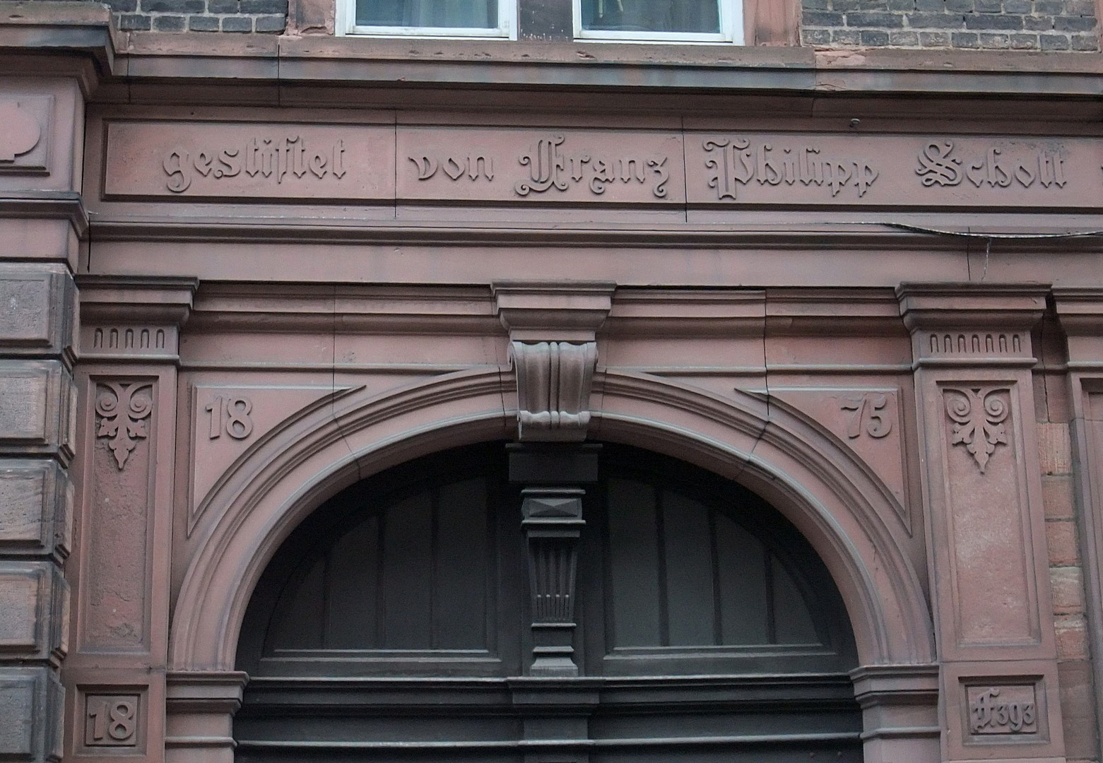 Schottenhof Mainz, Eingang